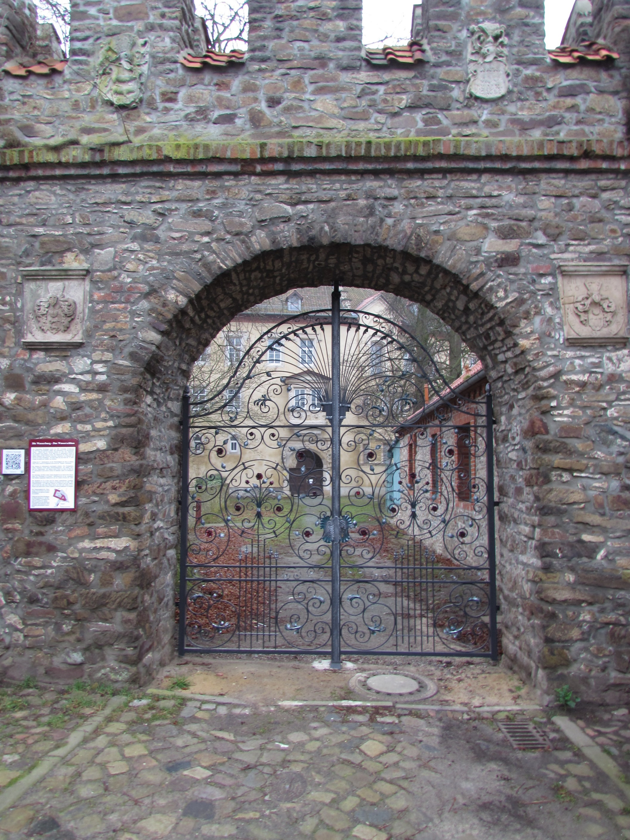 wasserburg/wasserschloss flechtingen torbogen